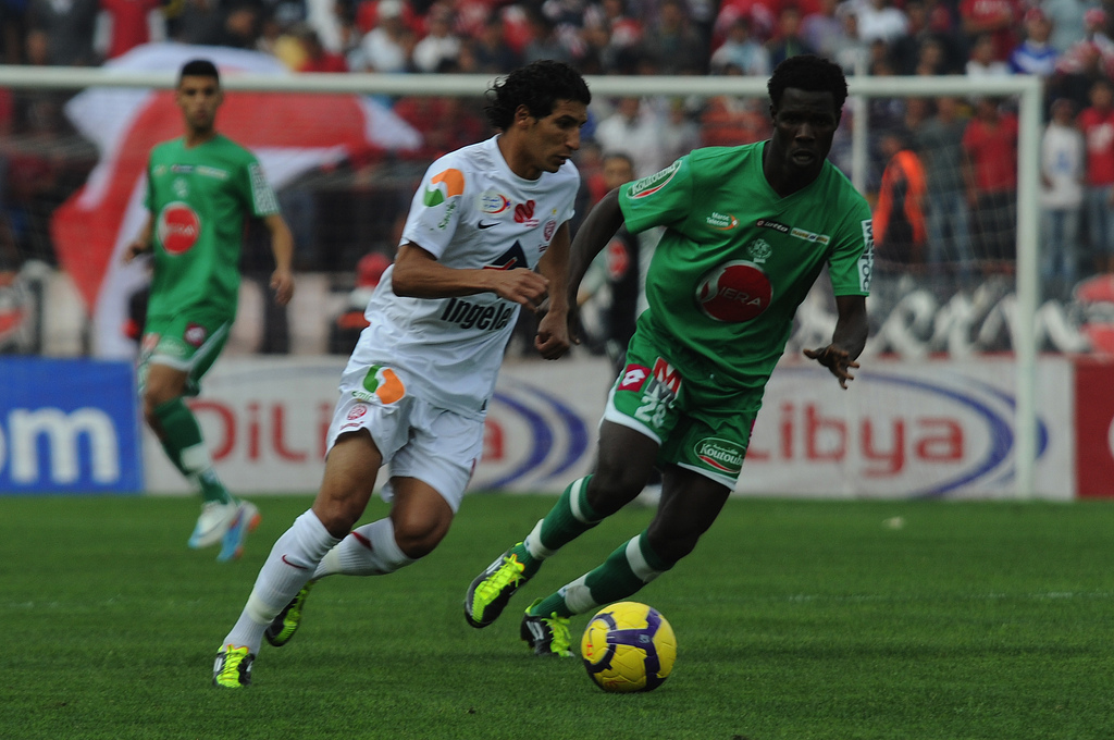 RCA vs WAC